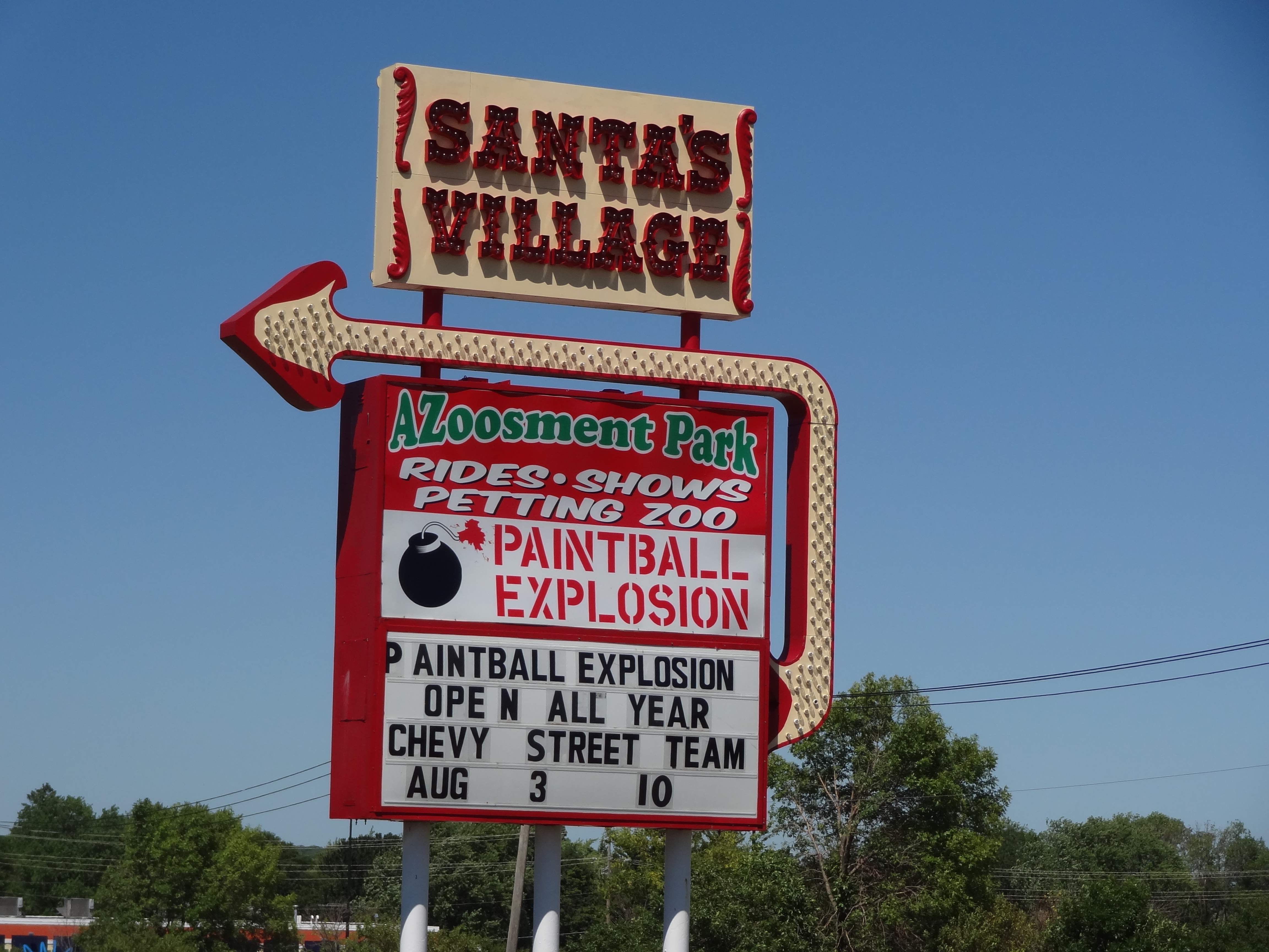 Santa's Village AZoosment Park